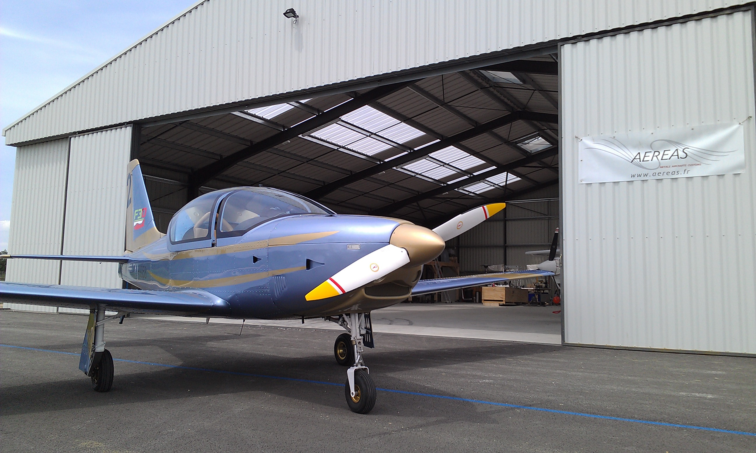 F30 RG Blue and Gold vue de Face coté gauche